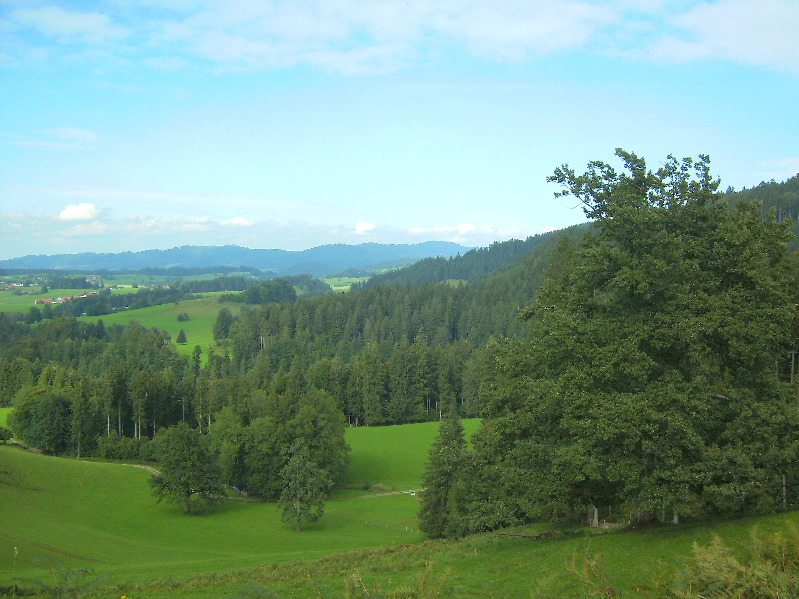 Adelegg, Nordausläufer der Allgäuer Alpen bei Isny im Allgäu vom Eistobel aus gesehen.